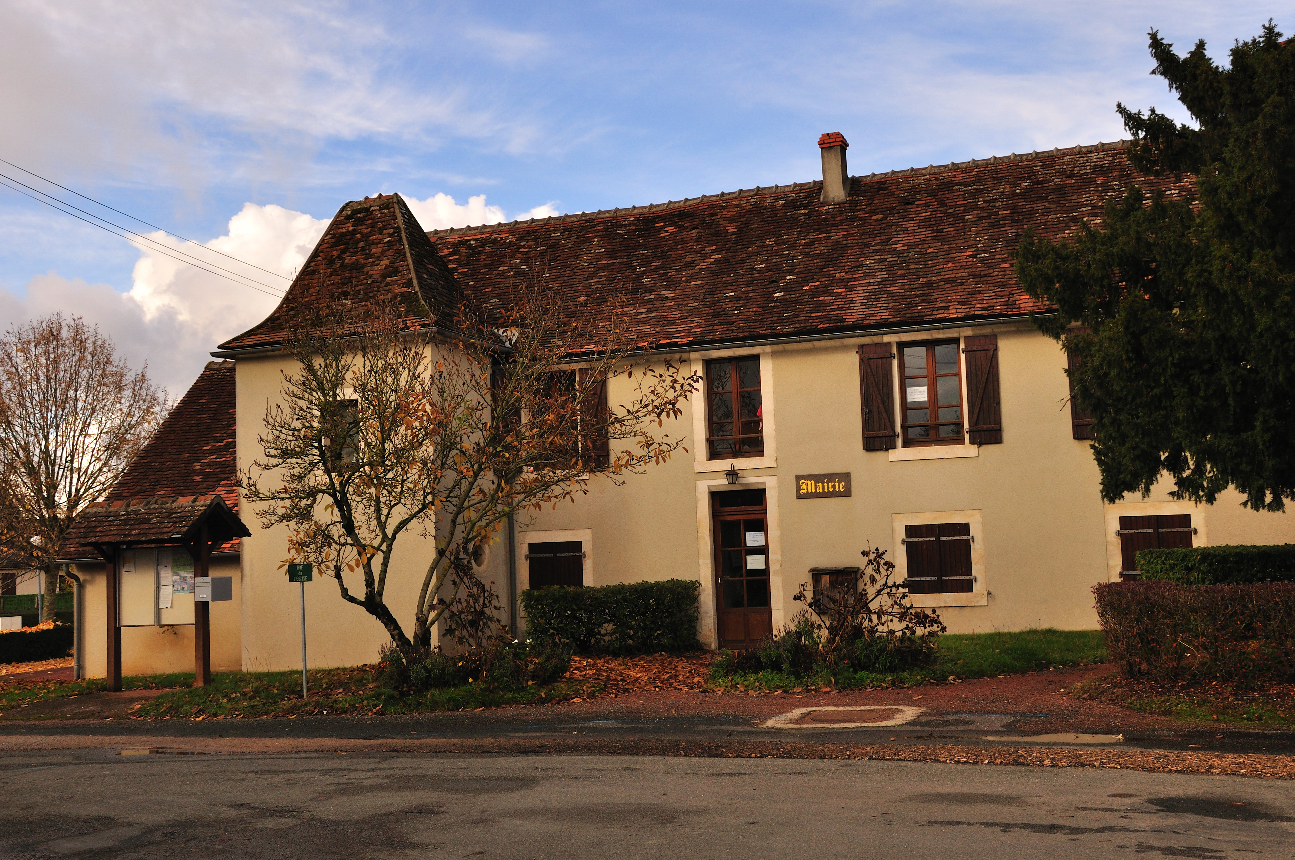 Mairie de Celon (Indre)